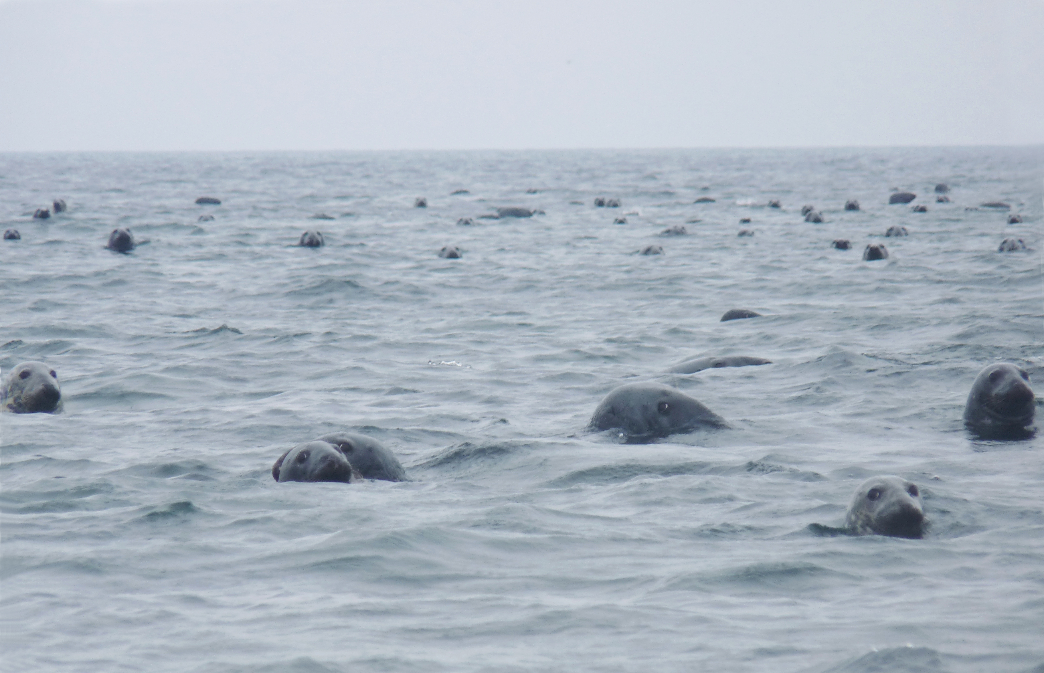 Troupeau de phoques près de l'ile Brion en 2011